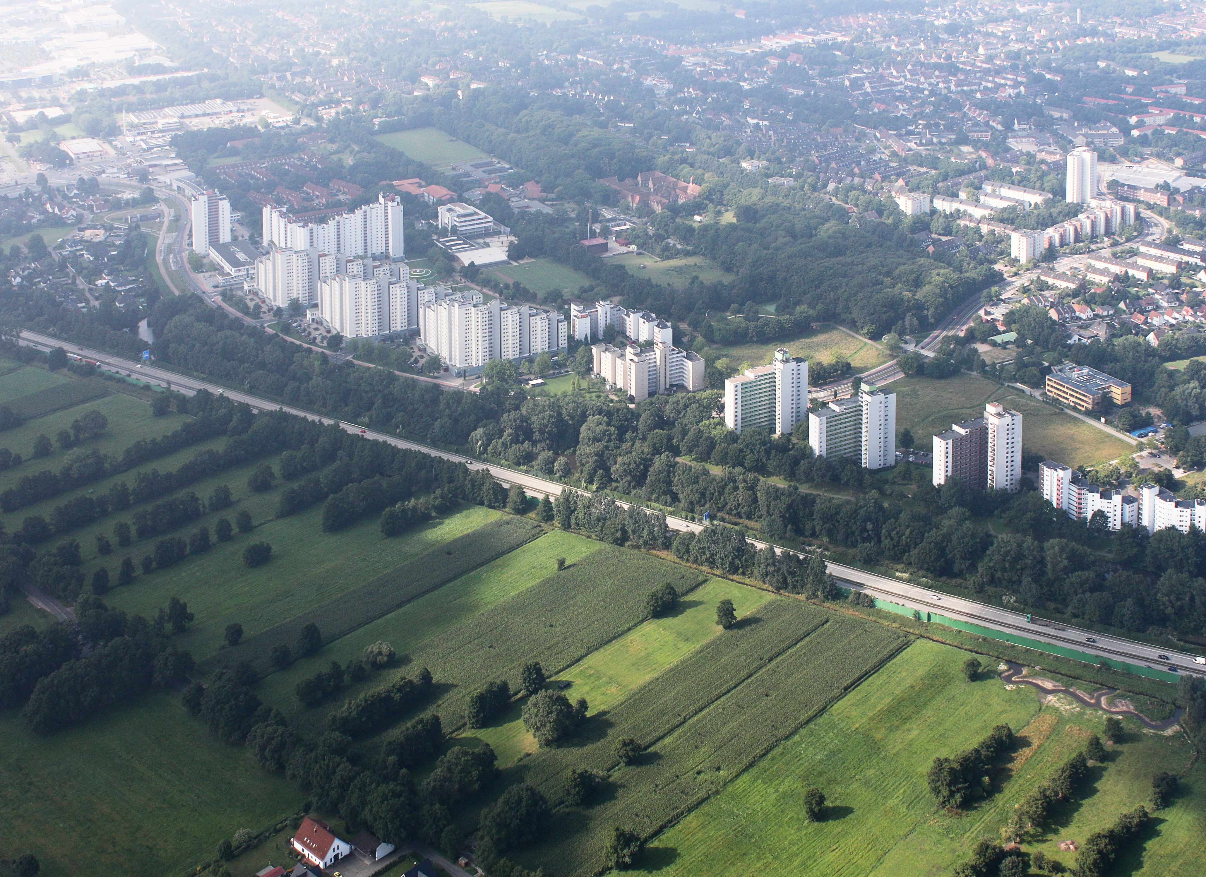 Luftaufnahme Bremen; entlang der A27 vom Weserpark (Bremer Kreuz; Blick aus der linken Flugzeugseite) zur Uni Bremen mit einem kleinen Abstecher zum Krankenhaus Bremen Ost; Flughöhe 500 m